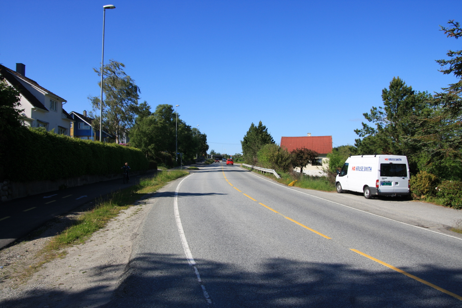 Fylkesvei 334 Ålgårdsveien